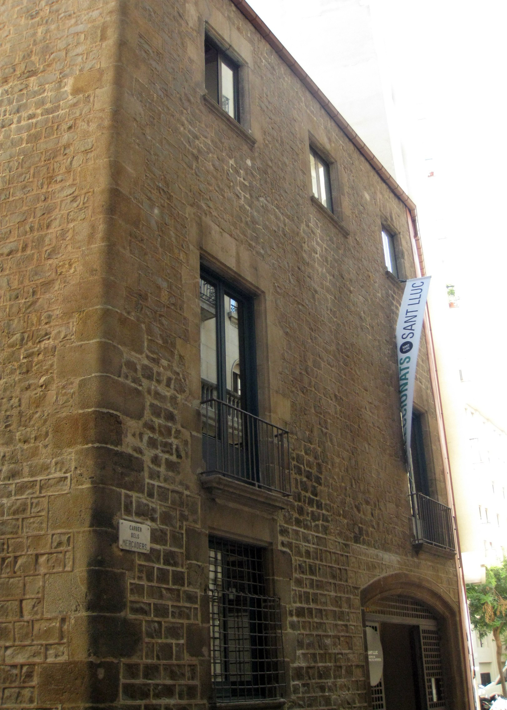 Palau situat al carrer dels Mercaders núm. 42, que conforma una sola parcel·la amb l'edifici de la plaça de les Beates núm. 2 i el carrer de les Beates núm. 2 (Barcelona). A la imatge, la façana de Mercaders.